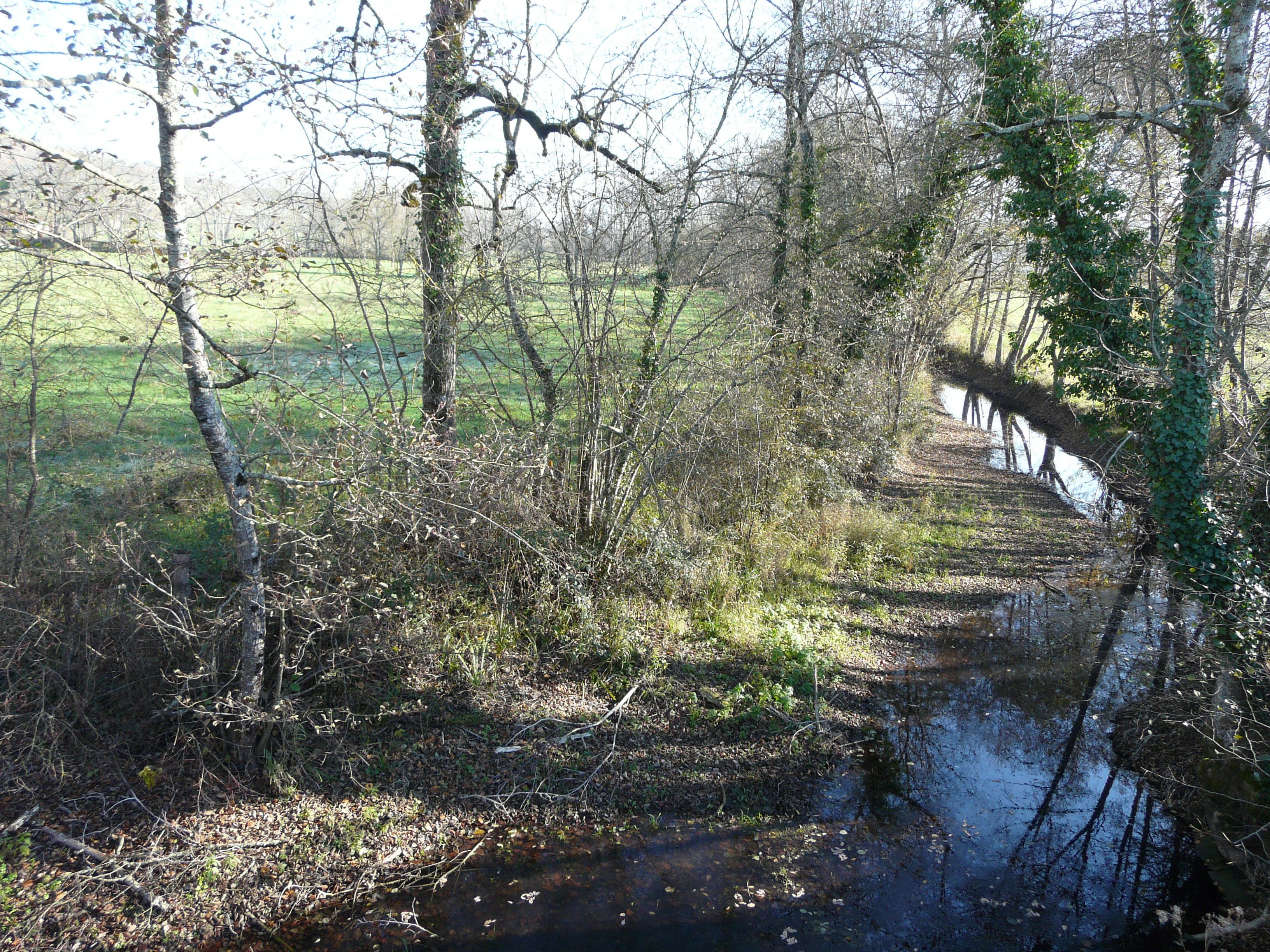 Le Vern en amont du pont de la route départementale 107, lieu-dit le Pont de Bruc, Grignols, Dordogne, France.